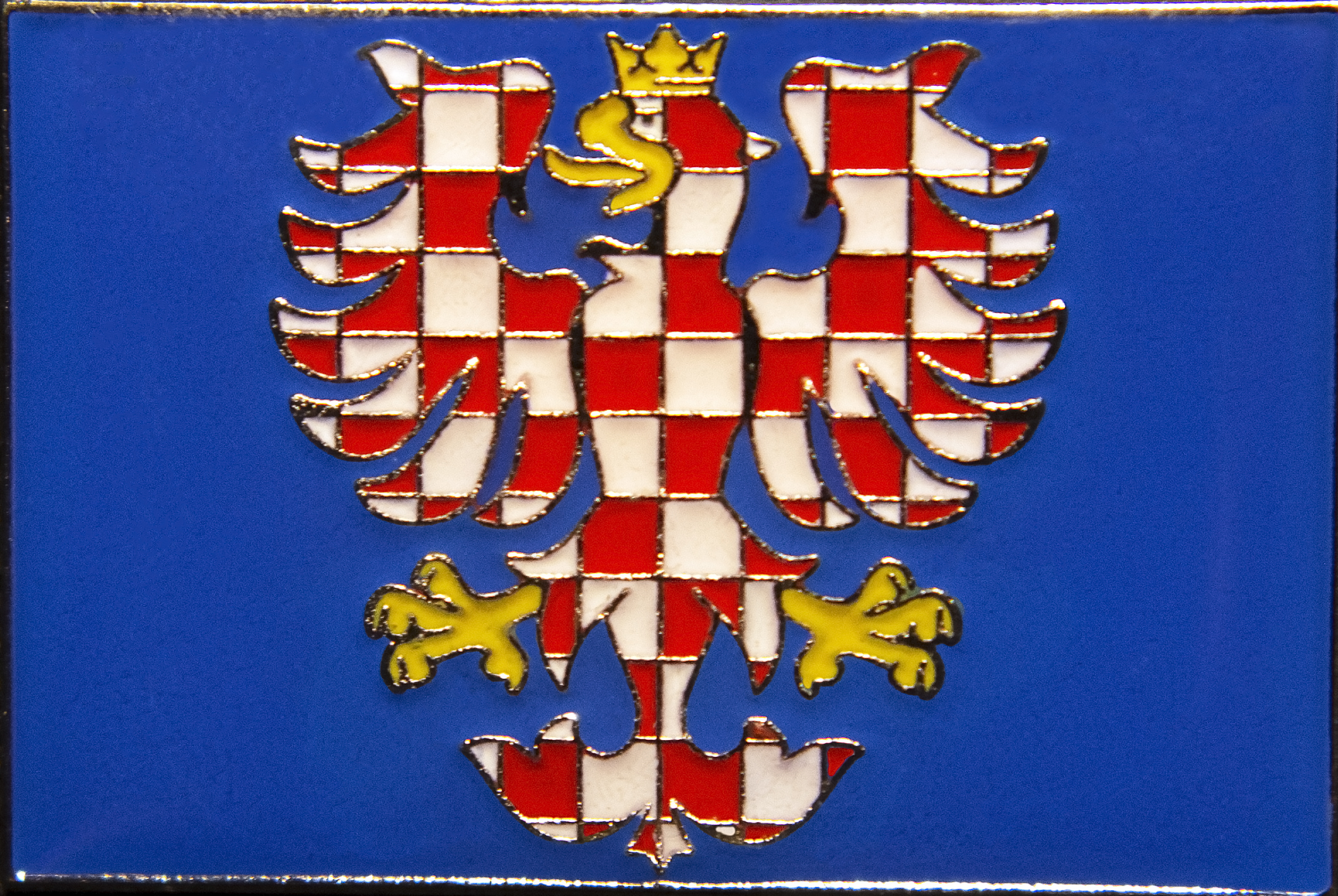 Popis odznaku: moravská vlajka v podobě velkého brožového odznaku zobrazujícího bíločerveně šachovanou orlici se žlutou korunou a zbrojí v modrém poli. Rozměry: 18 mm × 28 mm Na rubu je nápis: ALERION.CZ